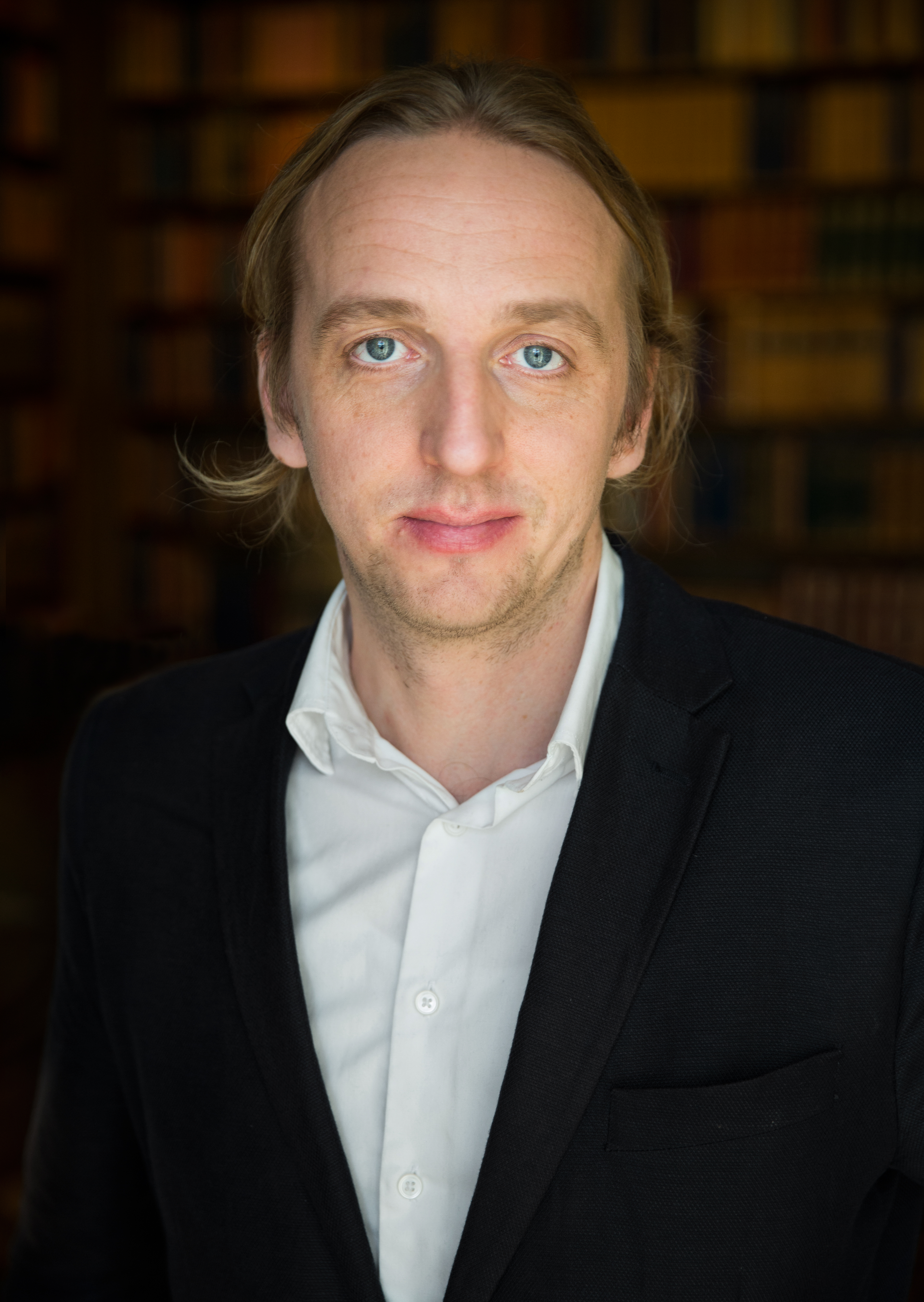 Journalisten Martin Schibbye.